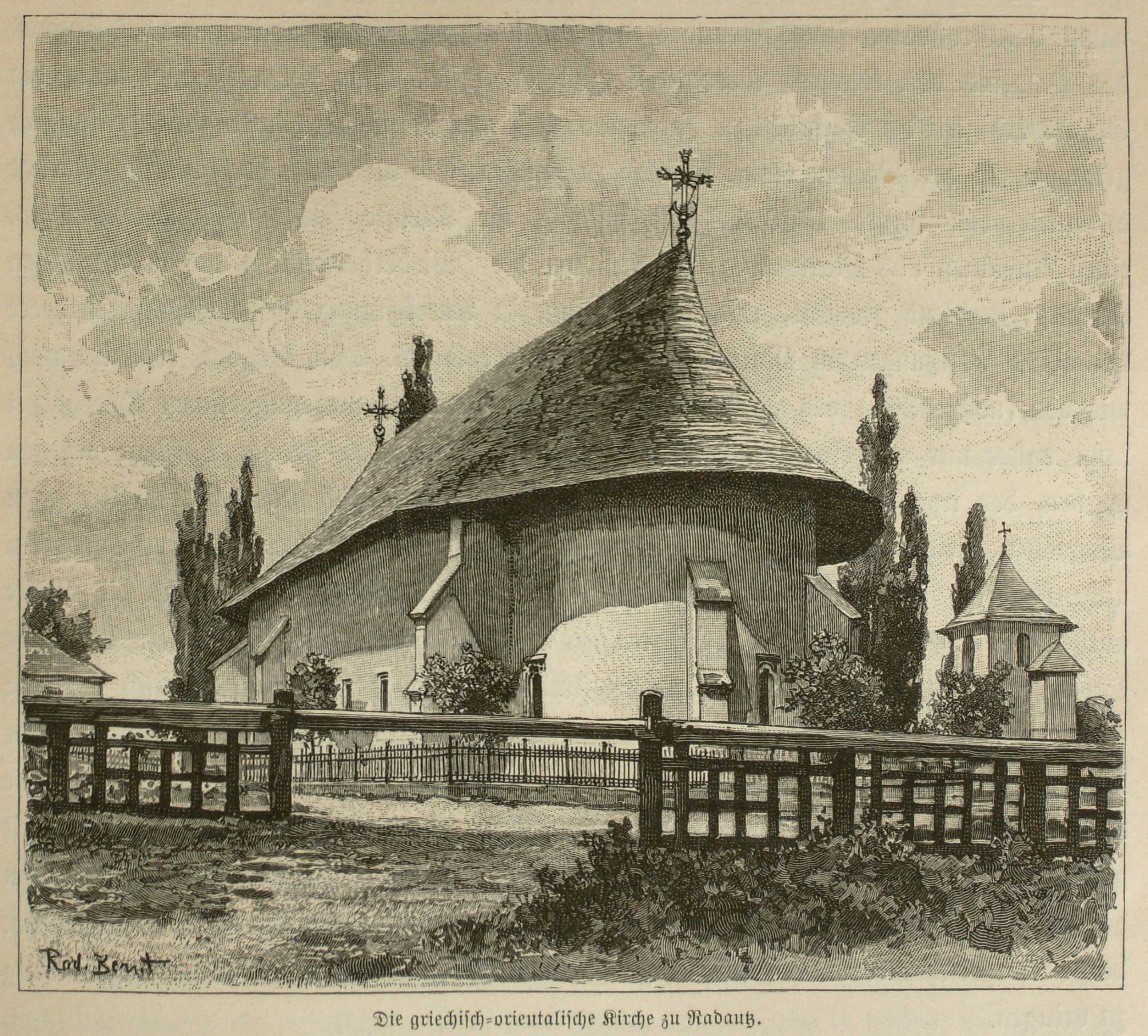 Mănăstirea Bogdana, approx. 1899.